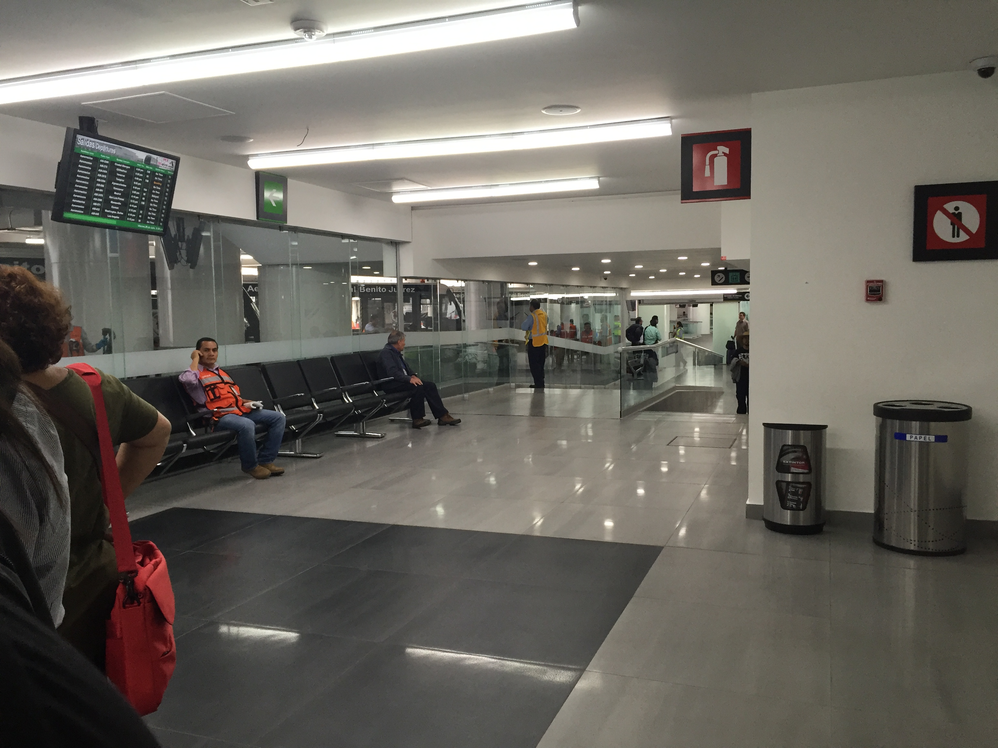 Nueva Sala 75 de la Terminal 2 del Aeropuerto Internacional de la Ciudad de México.